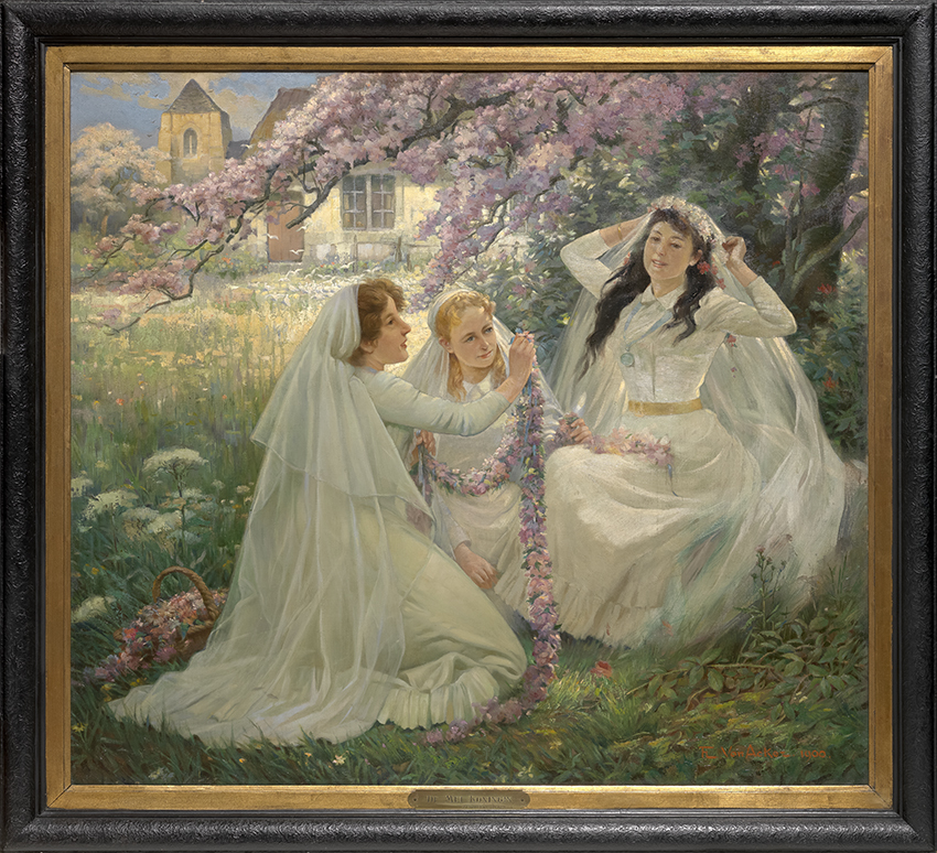 De meikoningin (Flori van Acker, 1900); collection: Musea Brugge - Groeningemuseum